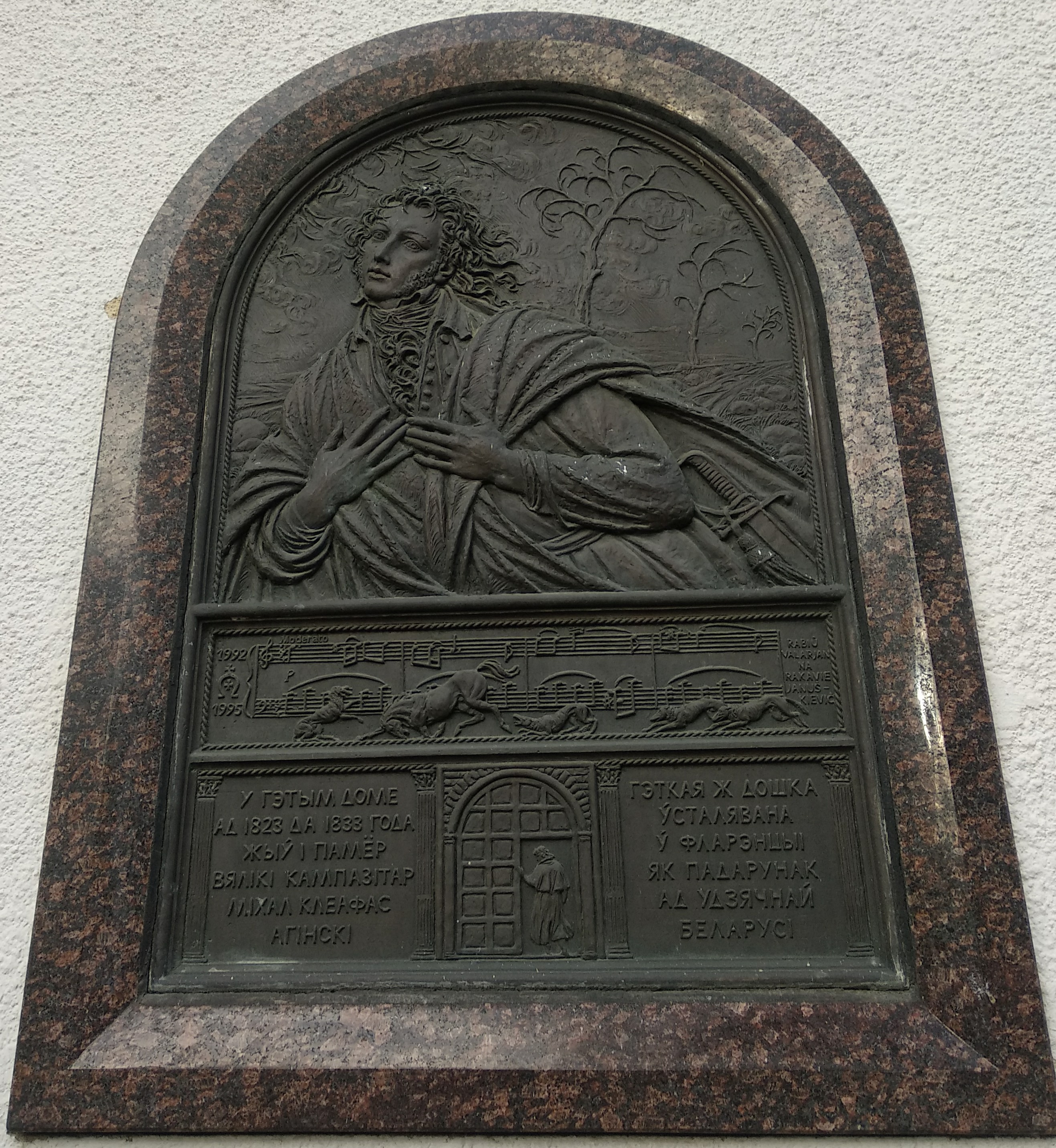 Maladzechna, Belarus